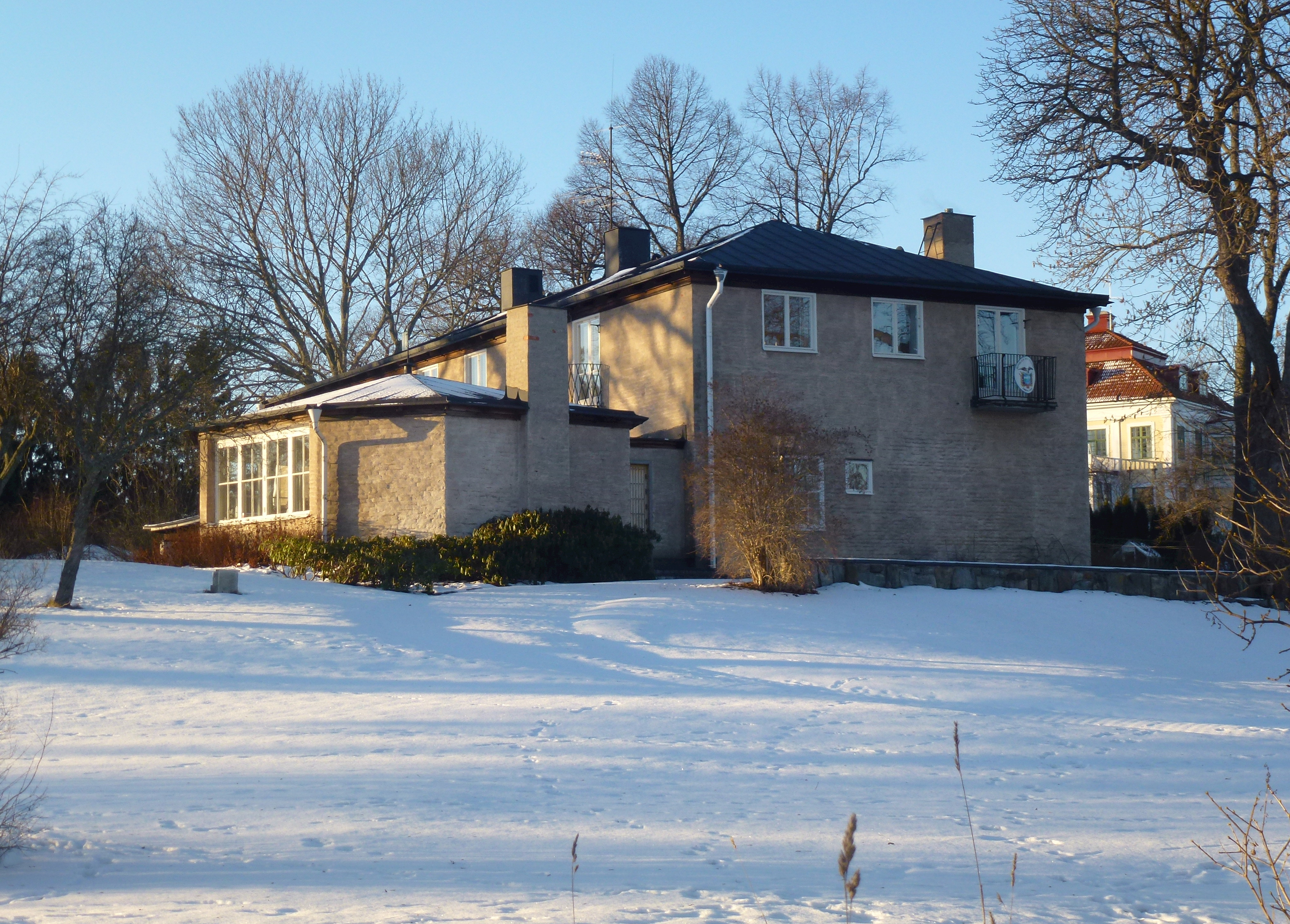 "Villa Wehtje", Ecuadors ambassad i Stockholm, ambassadörens residens, arkitekt Nils Tesch